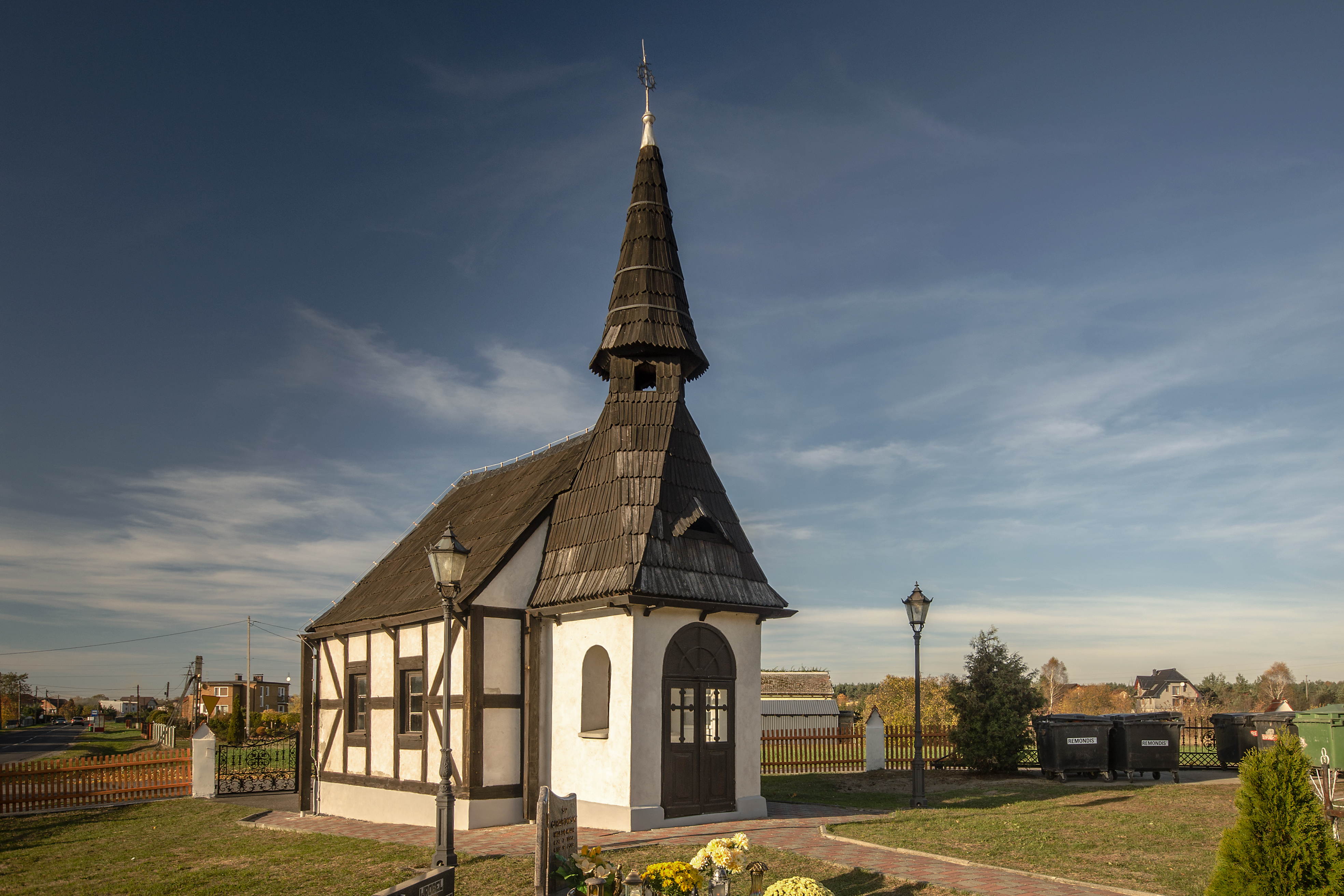 Dziergowice, kaplica cmentarna, 1794 (na cmentarzu par.)